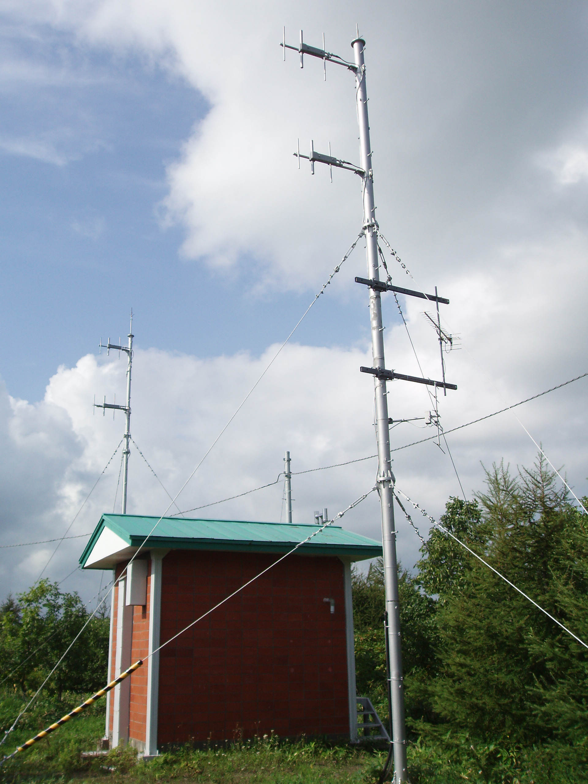 弟子屈中継局（アナログ） UHF送信設備は別途